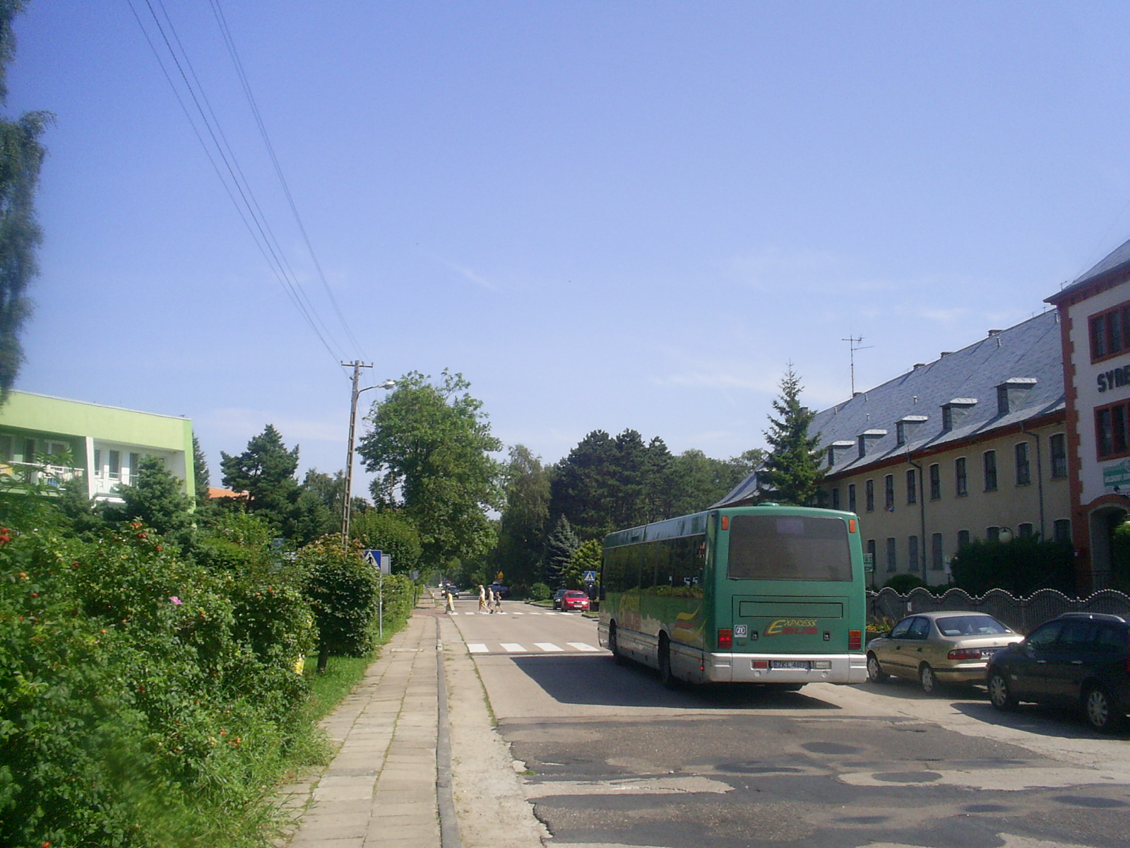 Rogowo